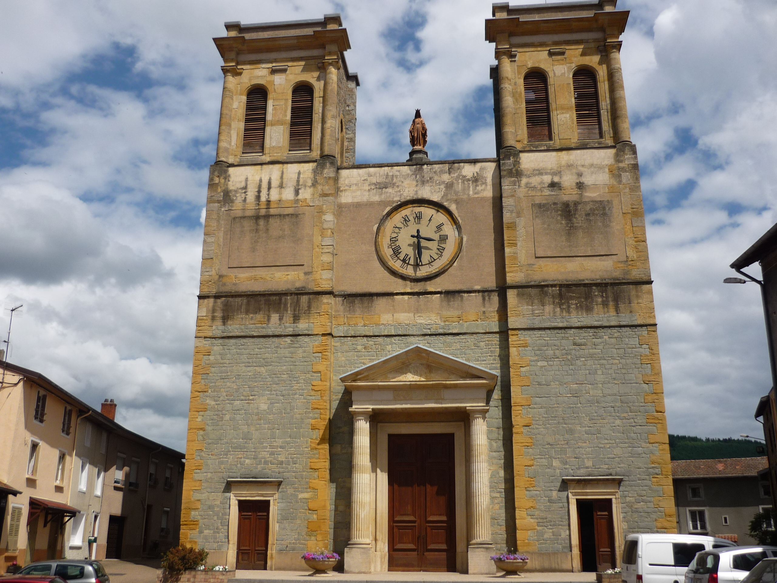 Église de Cublize dans le département du Rhône en France